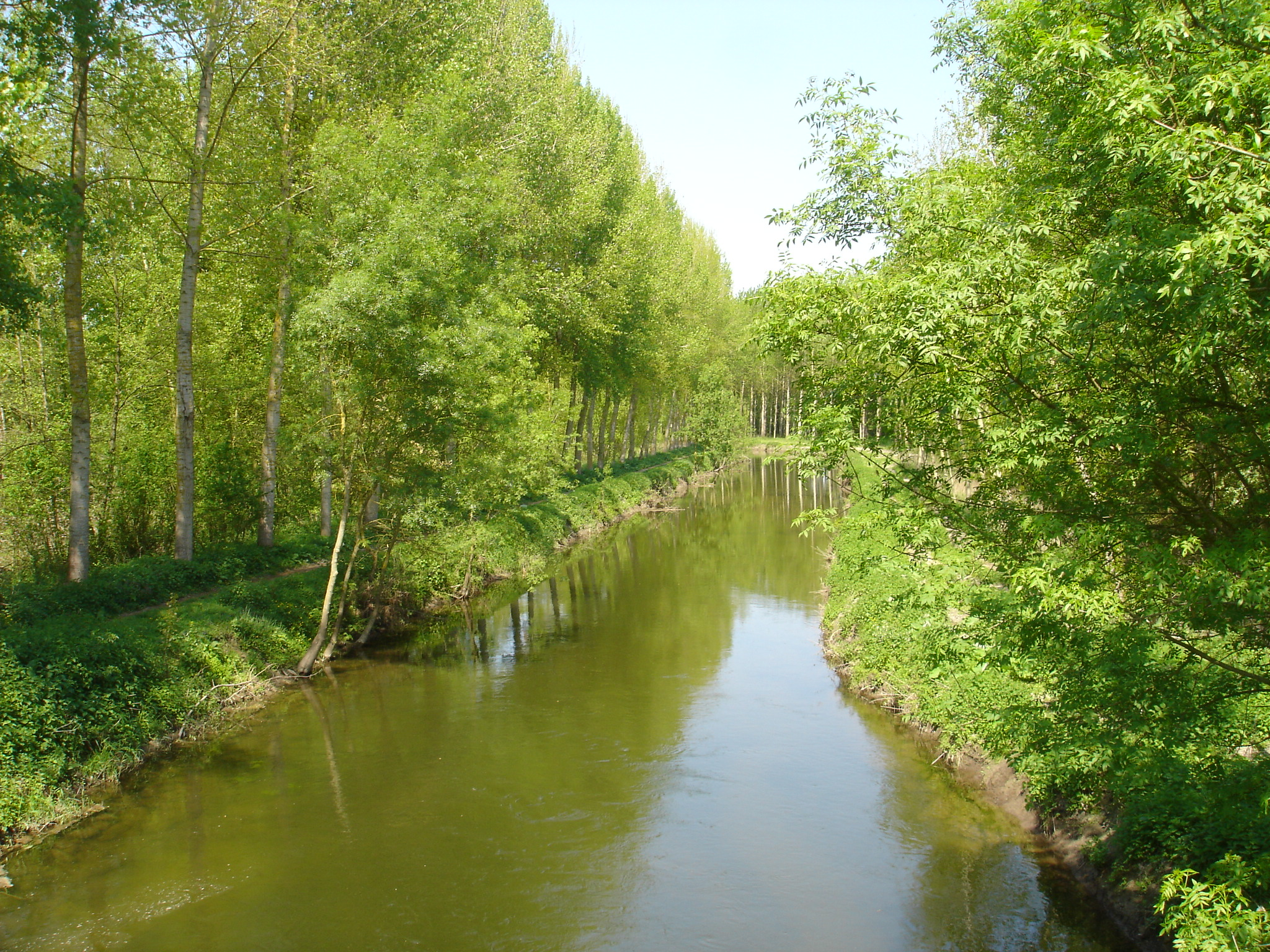 La Dive à proximité de son confluent avec le Thouet